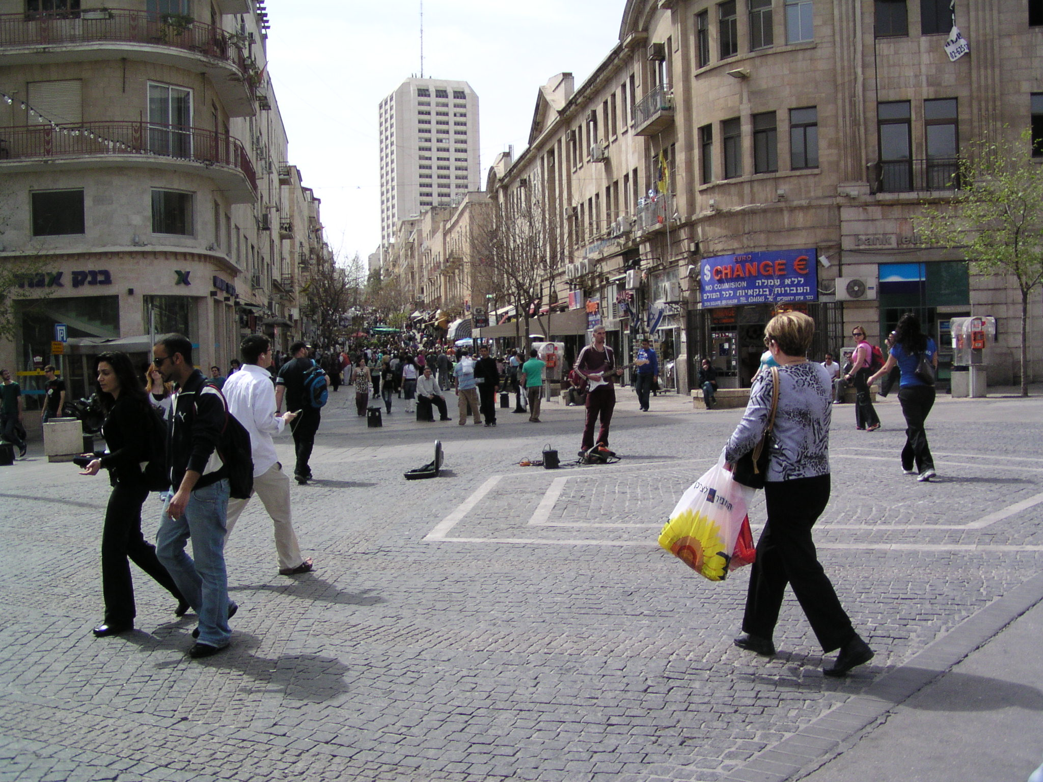 Zion Square during daytime, Jerusalem, Israel.